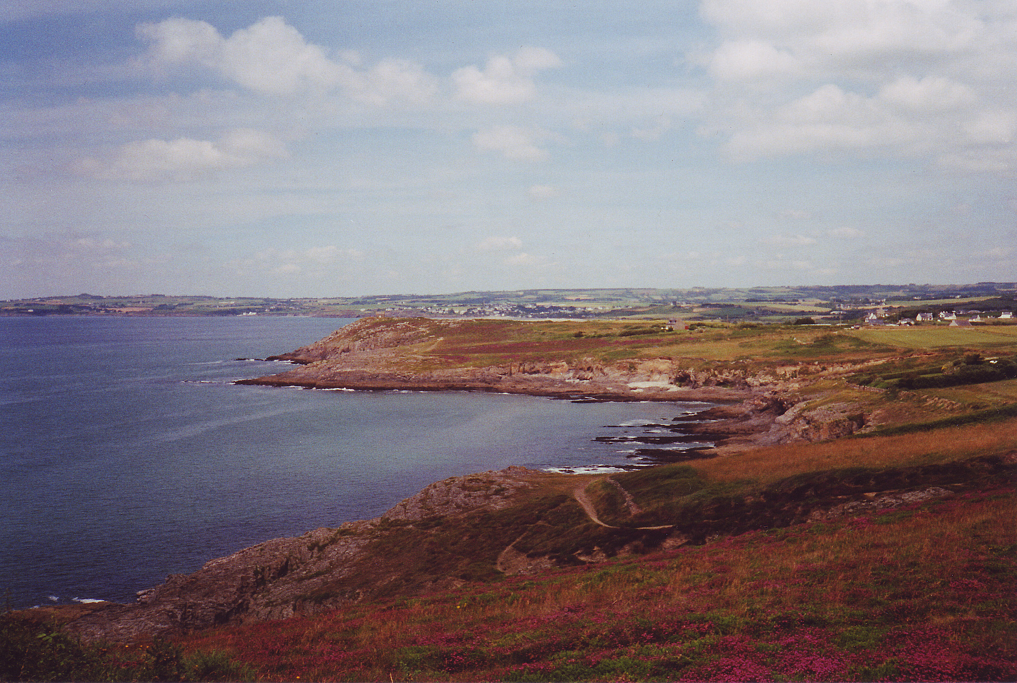 Baie de Douarnenez, vue sur la pointe de Talagrip (Finistère, Bretagne).